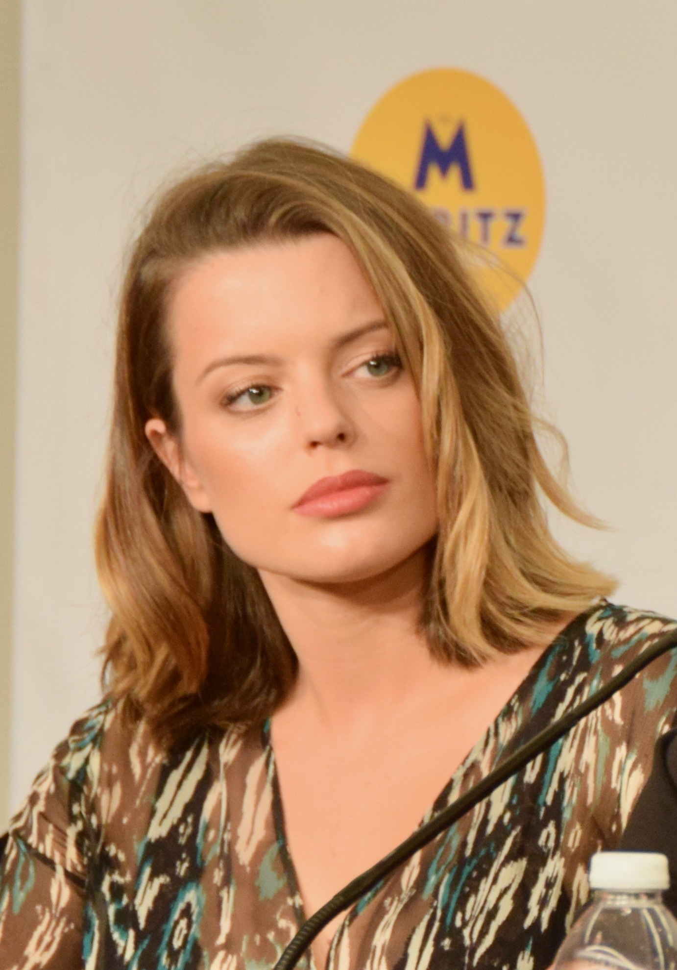 Festival de cinema de Sitges 2018